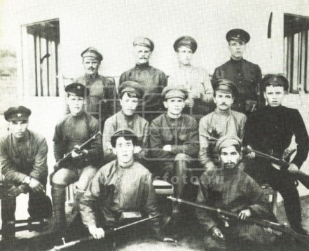 Агітпароплав "Червона зірка". Червоноармійці з комендантом. 1920-ті роки